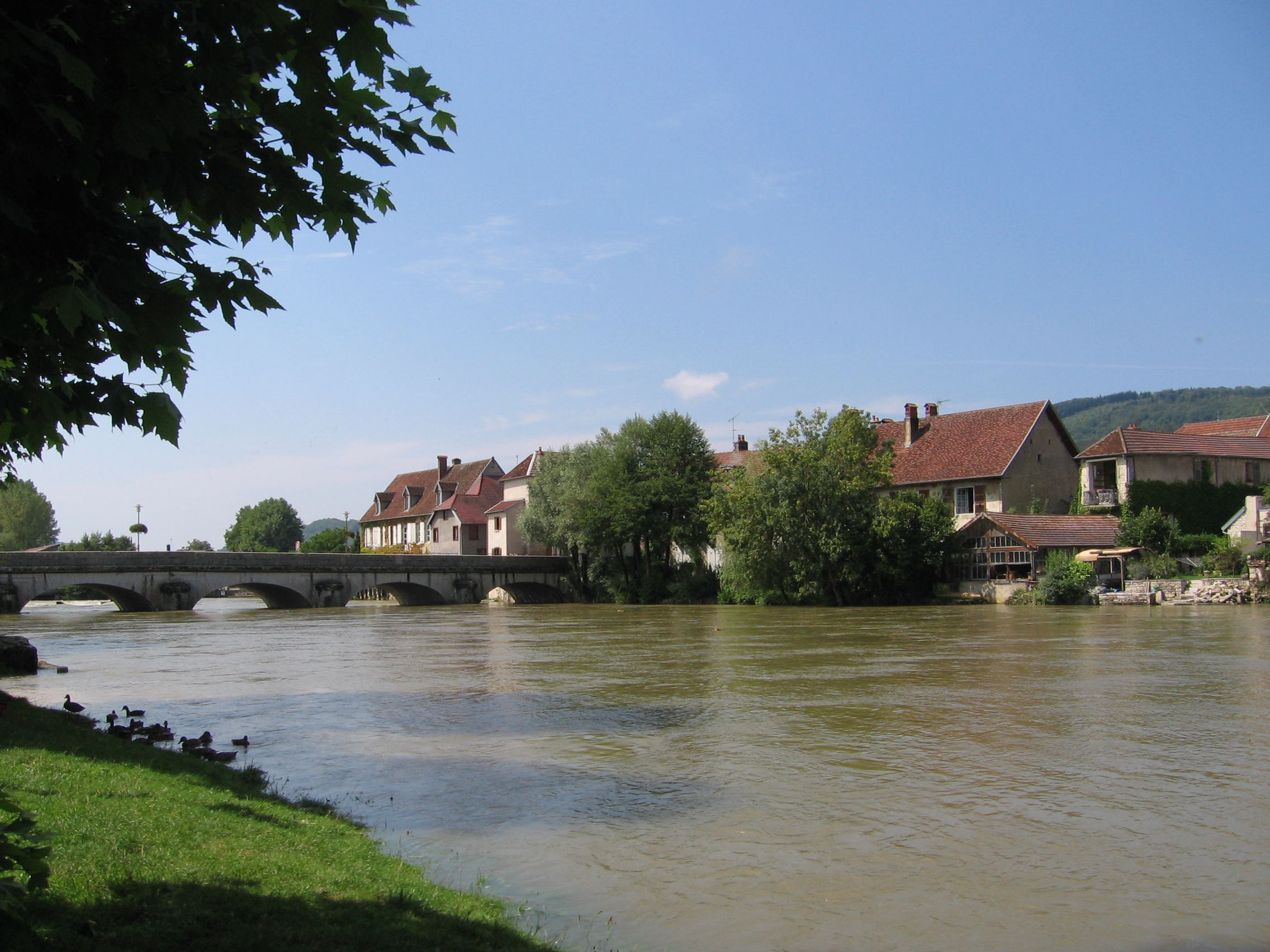 Quingey, Loue-river France